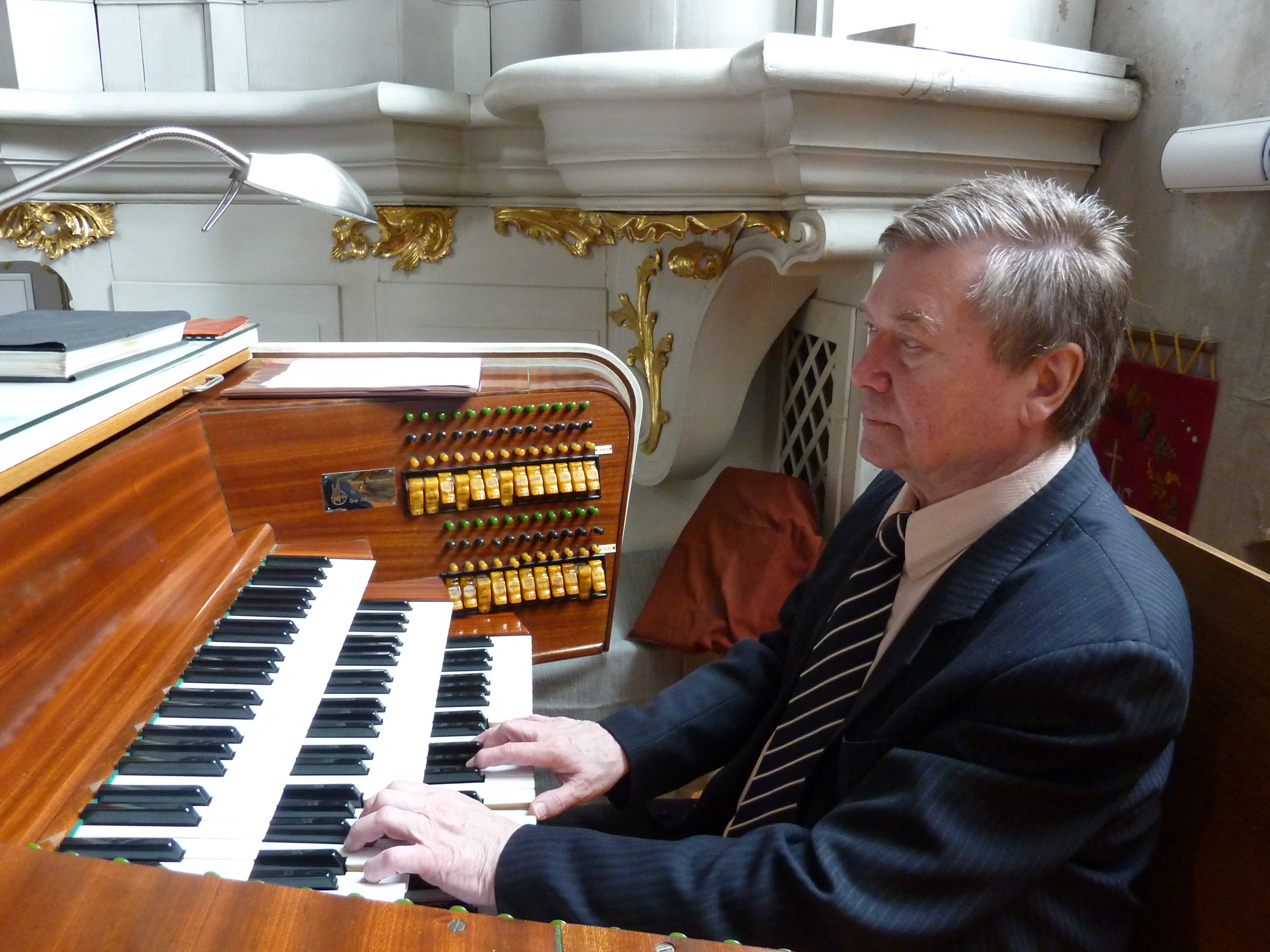 Zdeněk Hatina na kůru v Brně-Zábrdovicích